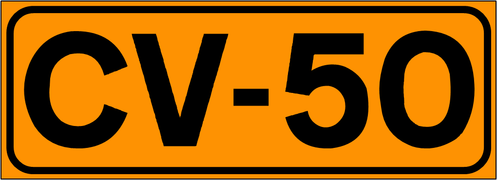 Inidcador de la Carretera de la Comunidad Valenciana CV-50